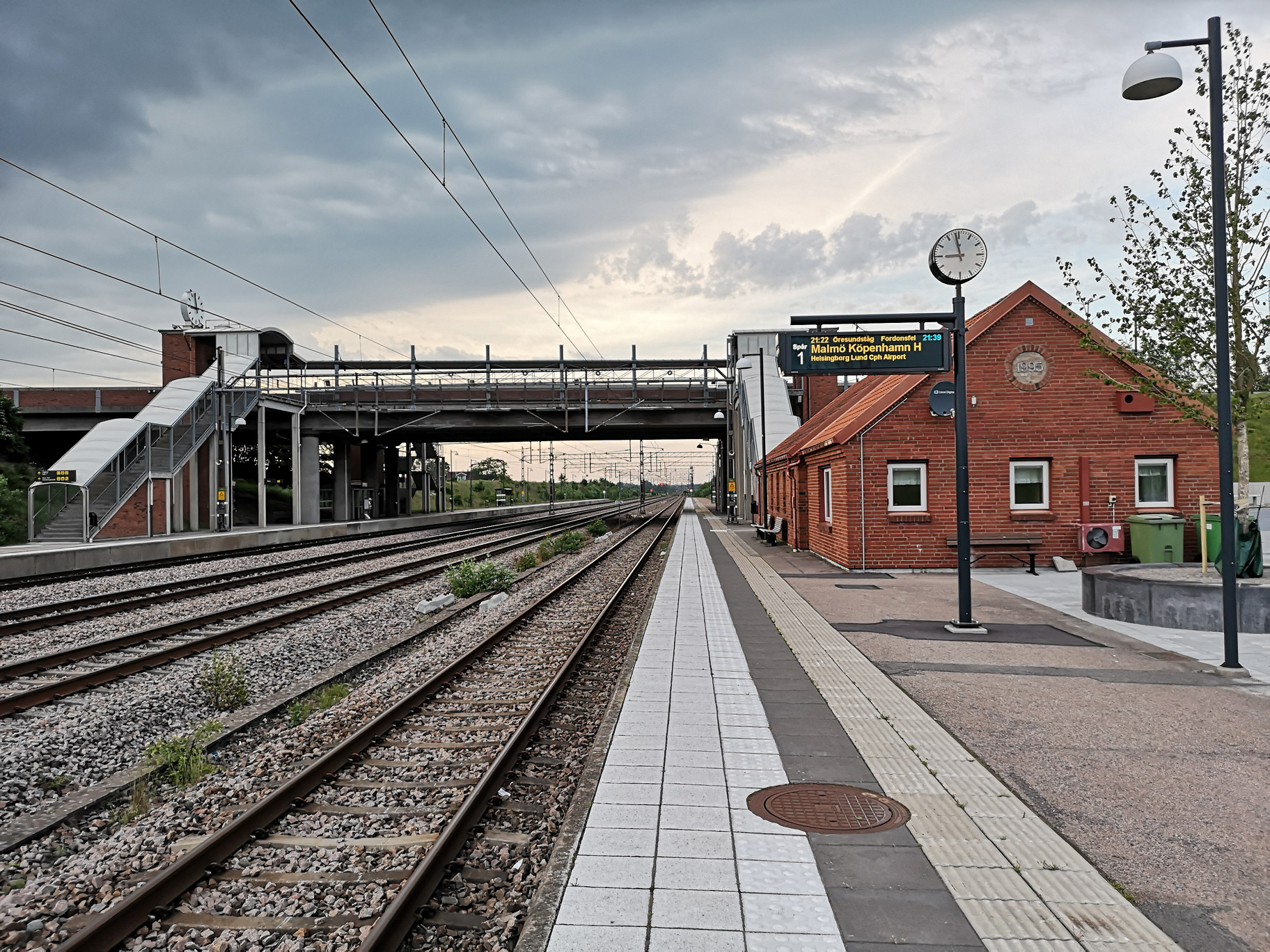 Laholms station.